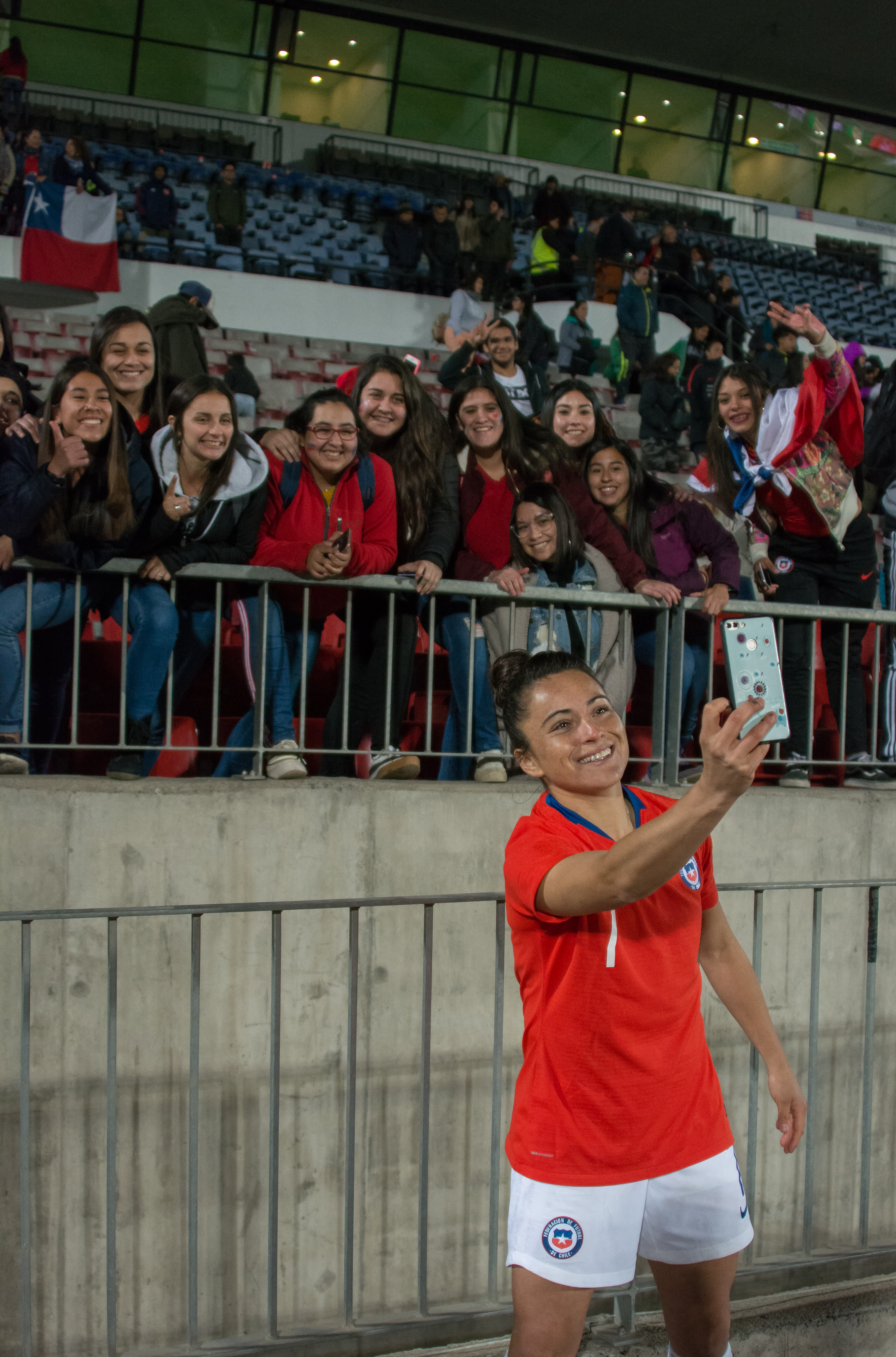 María José Rojas, Chile v Colombia, Estadio Nacional, Ñuñoa, Santiago, Chile.